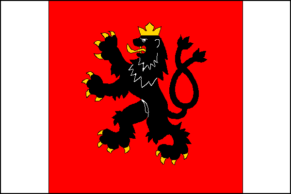 Prapor města Rožnov pod Radhoštěm